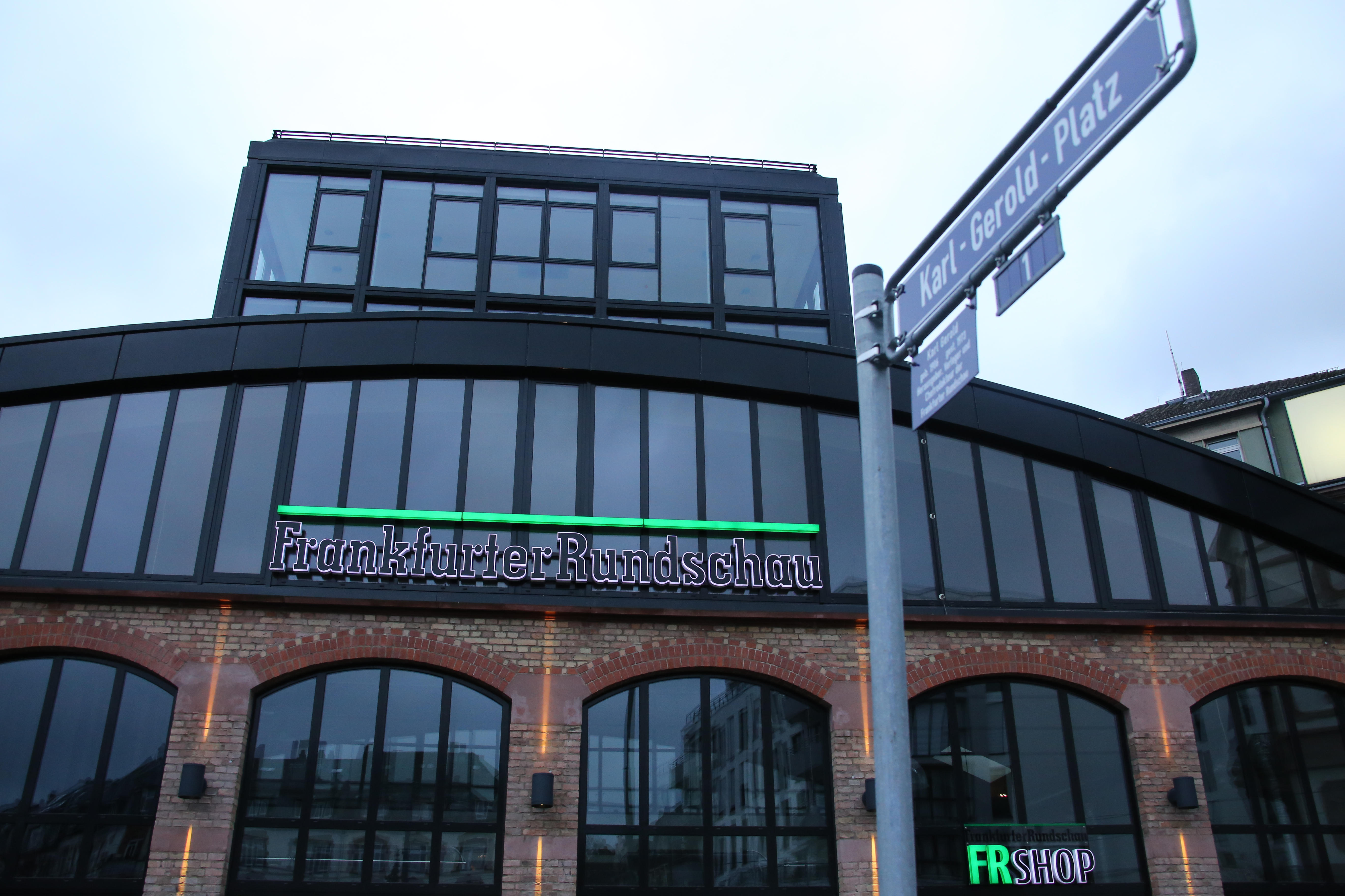 Frankfurter Rundschau, Depot Karl-Gerold-Platz